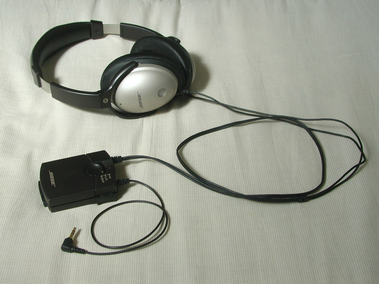 Bose Quiet Comfort 1